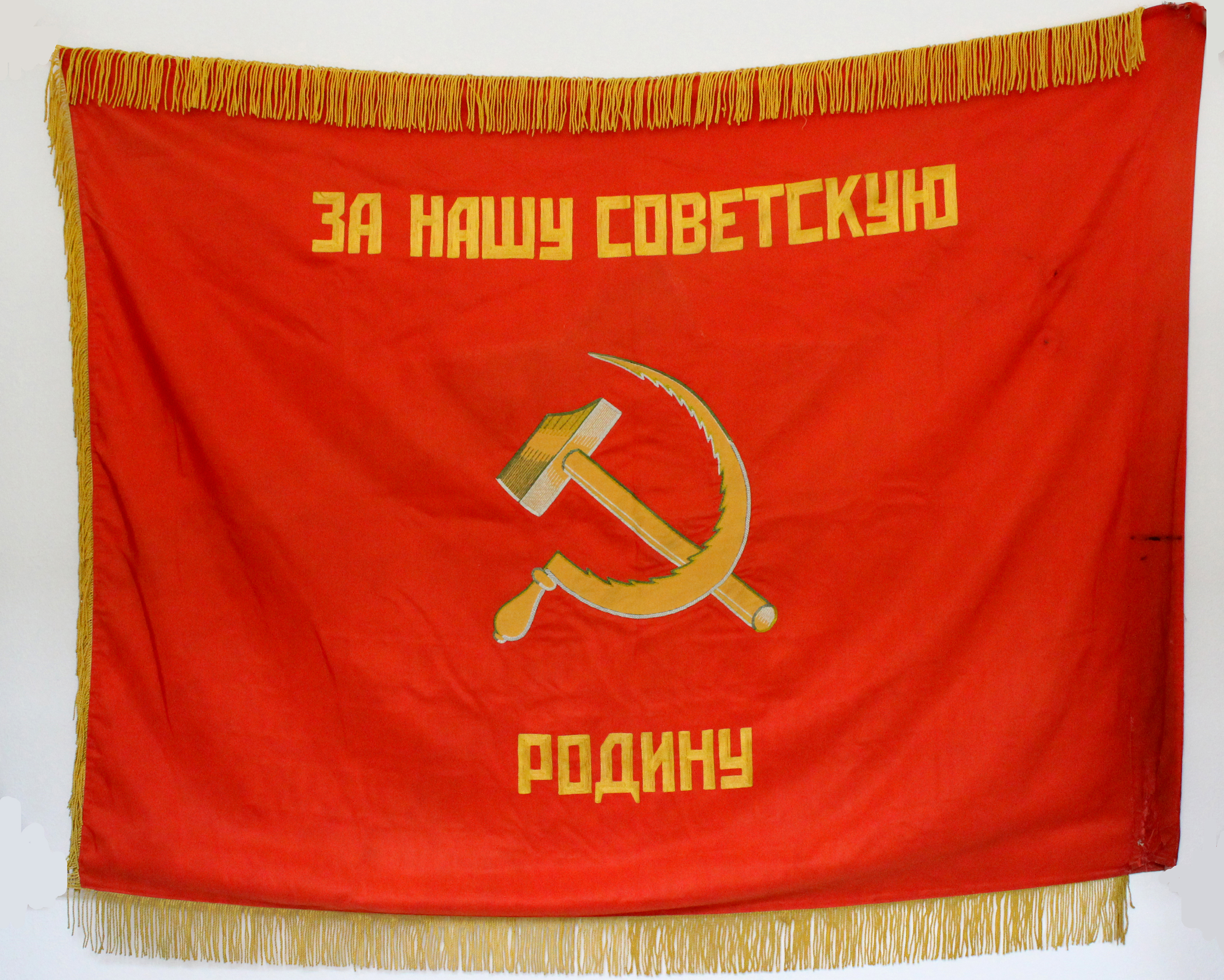 Знамя 117-го гвардейского мотострелкового полка. Реверс